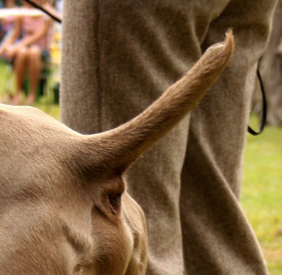 Wyżeł_weimarski na krajowej wystawie w Rybniku - Kamieniu